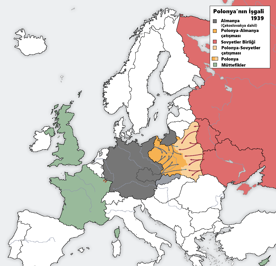 1939'da Polonya'nın Nazi Almanyası ve SSCB tarafından işgalini gösteren harita.